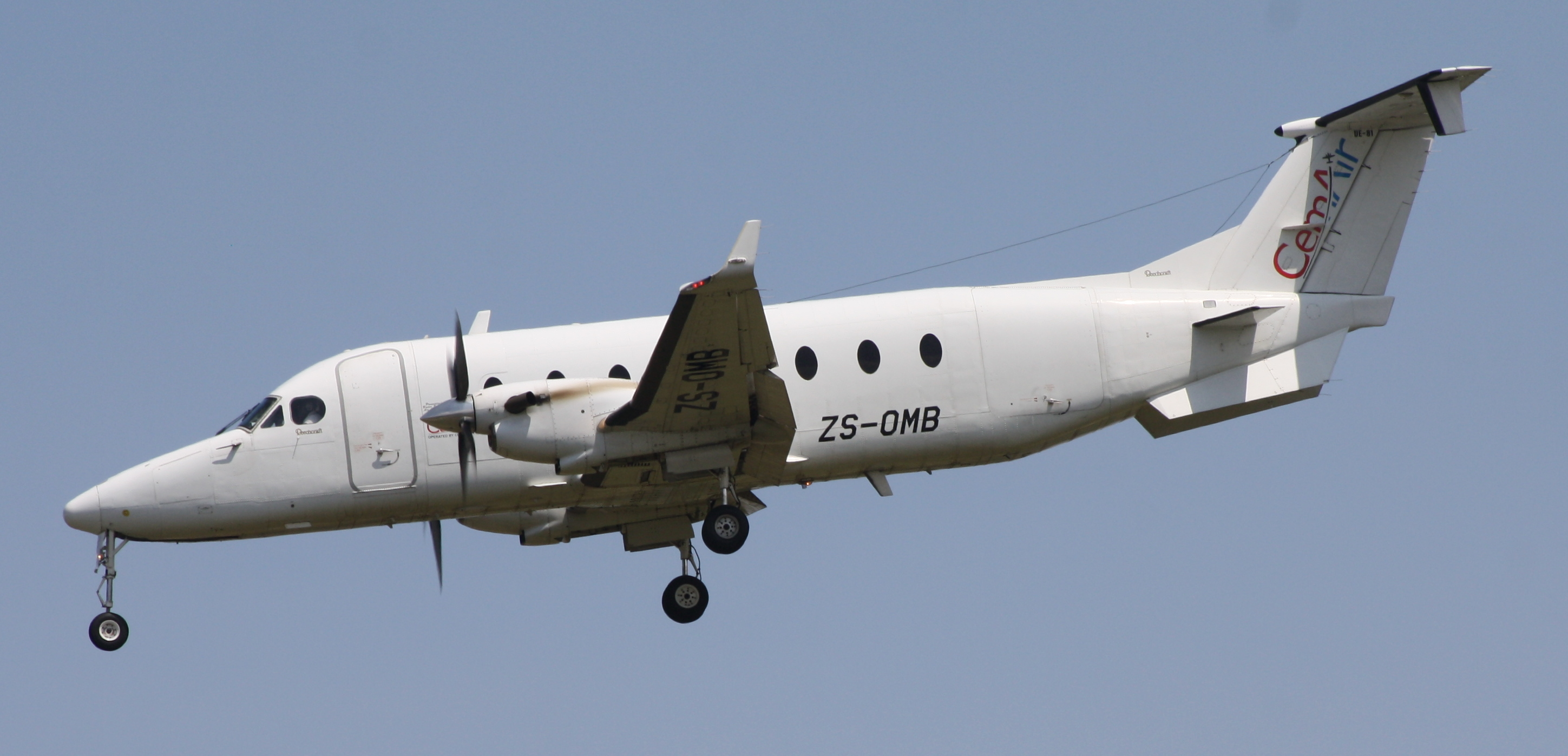 Cemair B1900D ZS-OMB